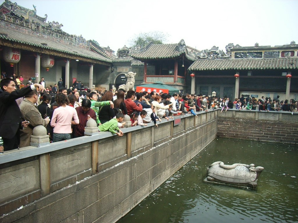 佛山祖廟建築群位於祖廟路二十一號佛山市博物館內，由祖廟、孔廟、碑廊、陳列館和園林組成，與黃飛鴻紀念館相通,占地 18600平方米，在1985年8月27日立之為全國重點文物保護單位